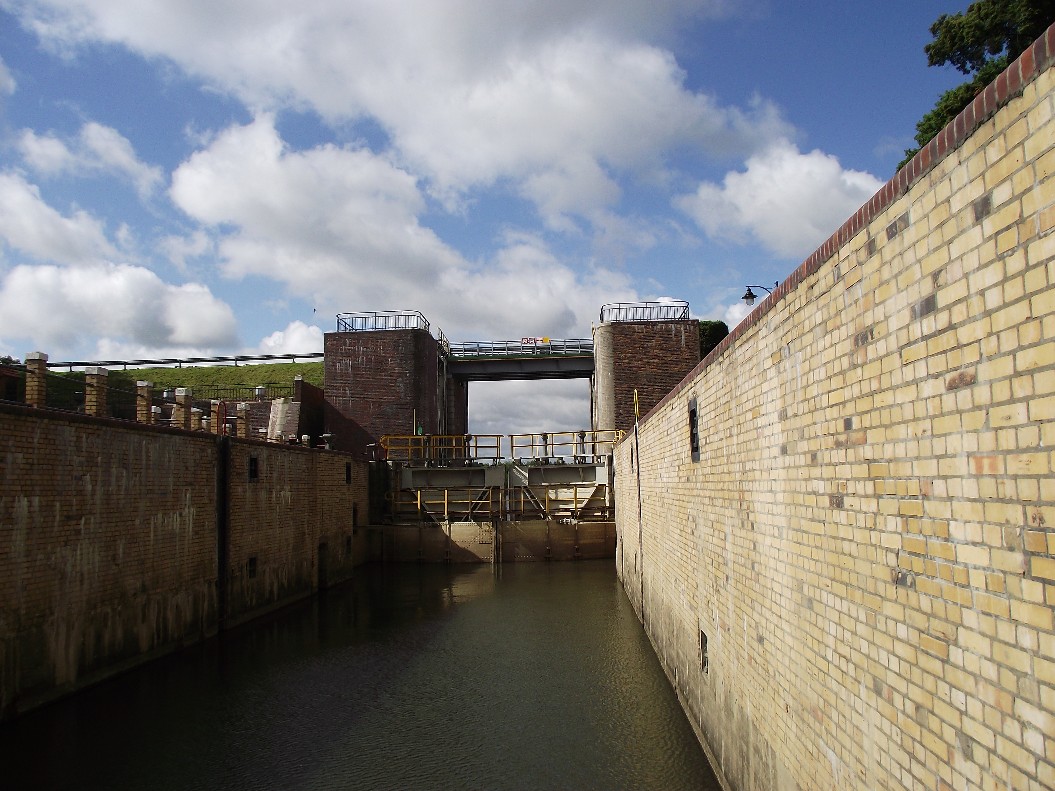 Śluza Biała Góra na Nogacie